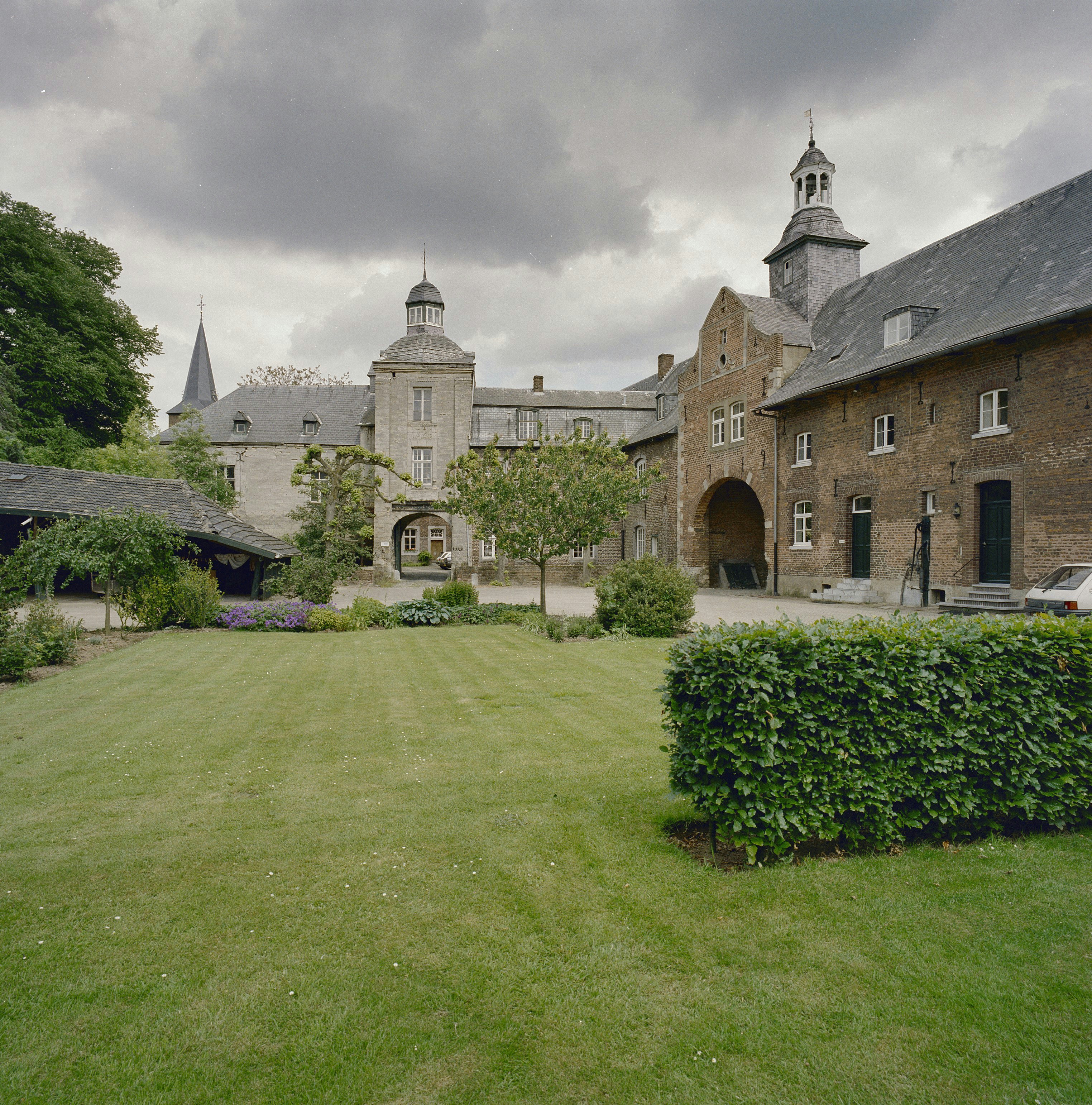 Kasteel Wijnandsrade: Exterieur BINNENPLAATS HOEVE